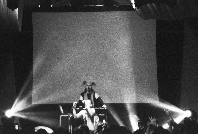 Das Ich @ Dark Omen II Festival - Château de Vaux-le-Pénil